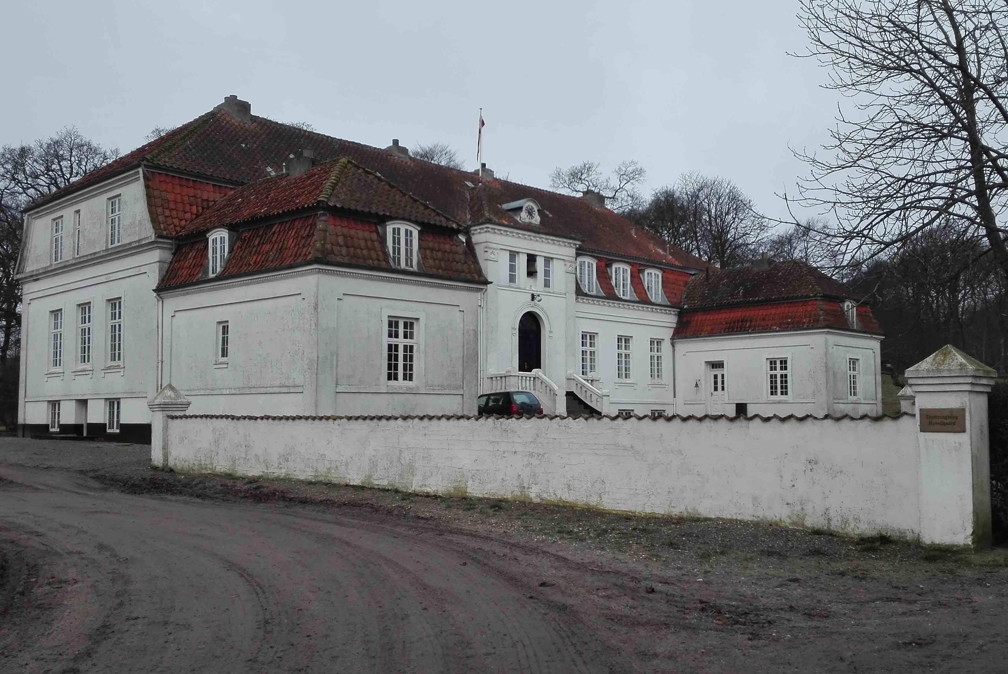 Dronningborg Hovedgård fra øst